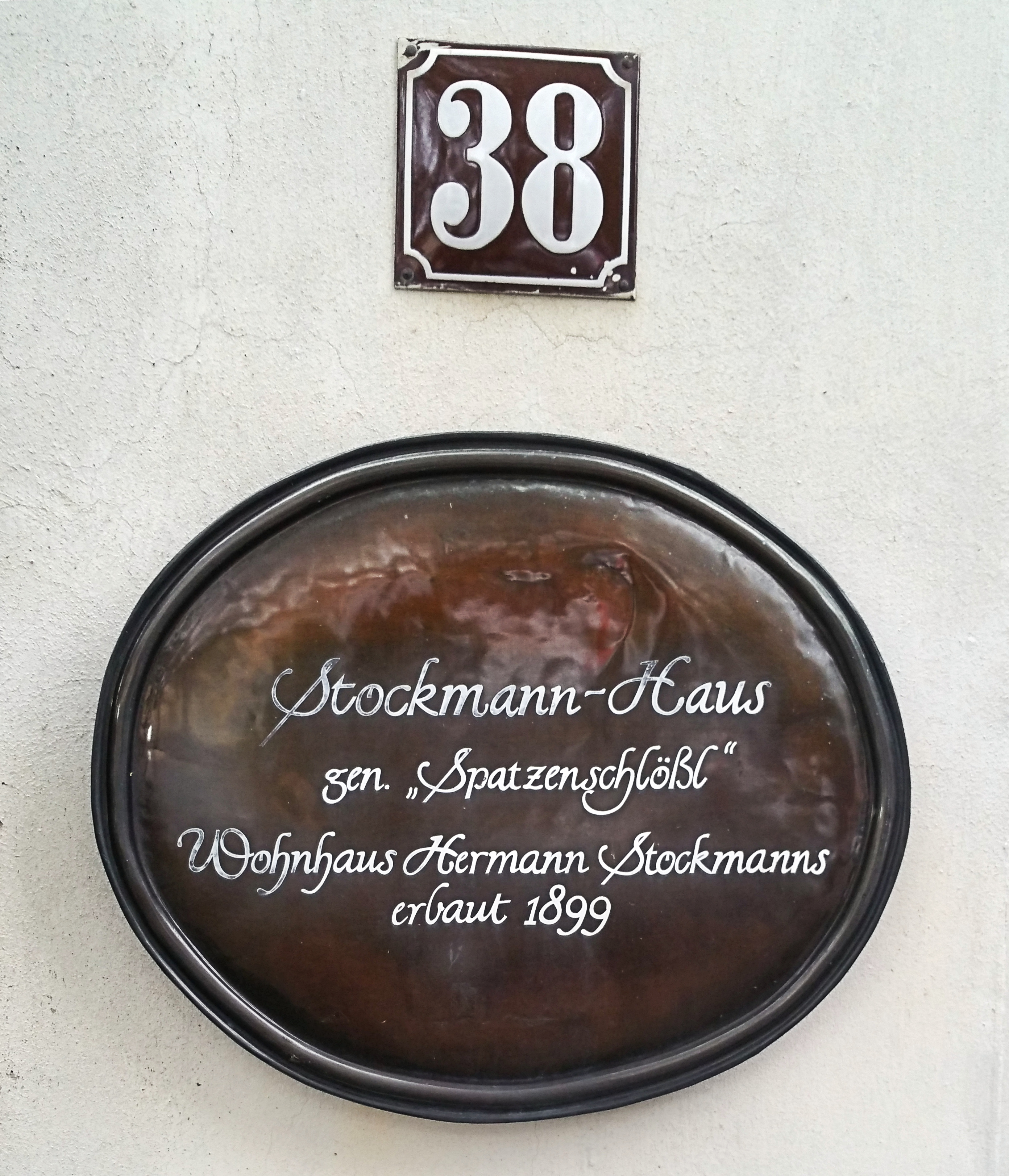 Deutschland, Bayern, Landkreis Dachau, Stadt Dachau, Info-Tafel am Stockmann-Haus in der Münchner Str. 68